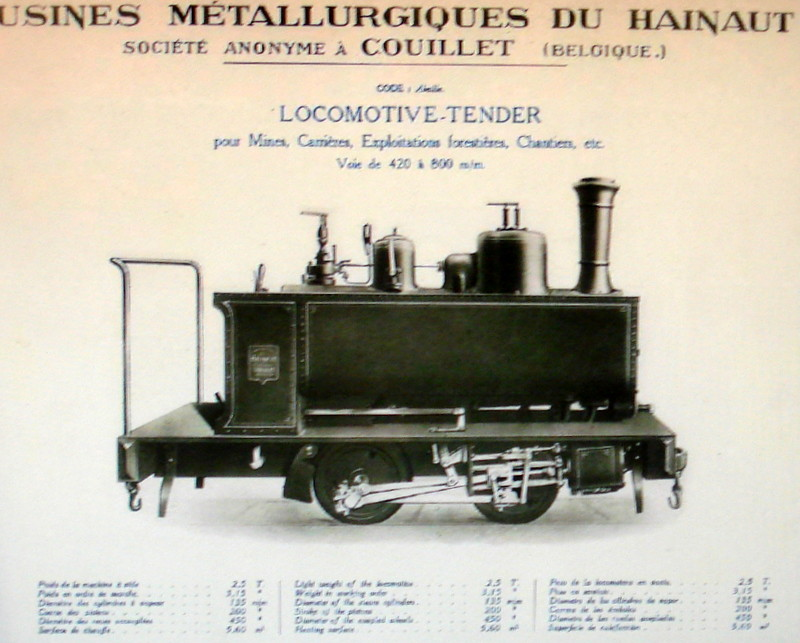 Decauville Locomotive-Tender, Usines Metallurgiques du Hainaut, Societe Anonyme a Couillet (Belgique)